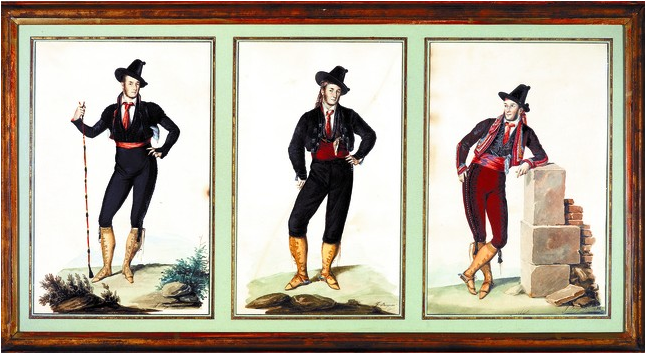 Triple retrato de Richard Ford como ‘majo serio’ en la Feria de Mairena, 1832. Acuarela sobre papel. José Domínguez Bécquer